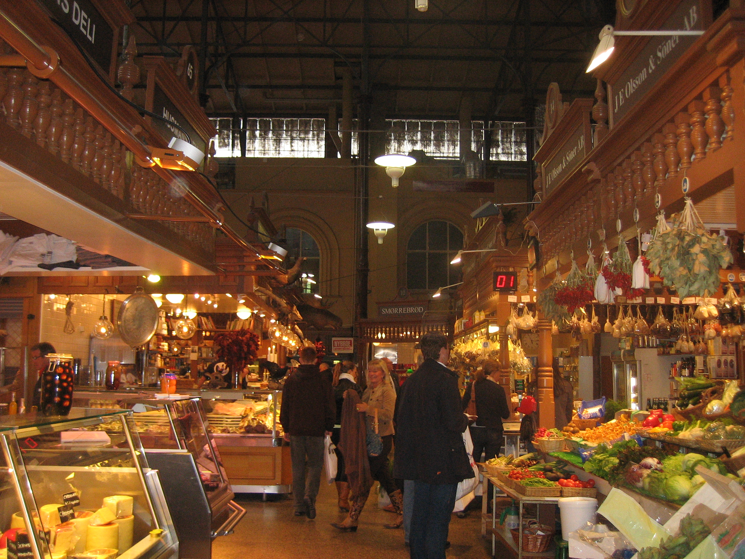 Östermalms saluhall